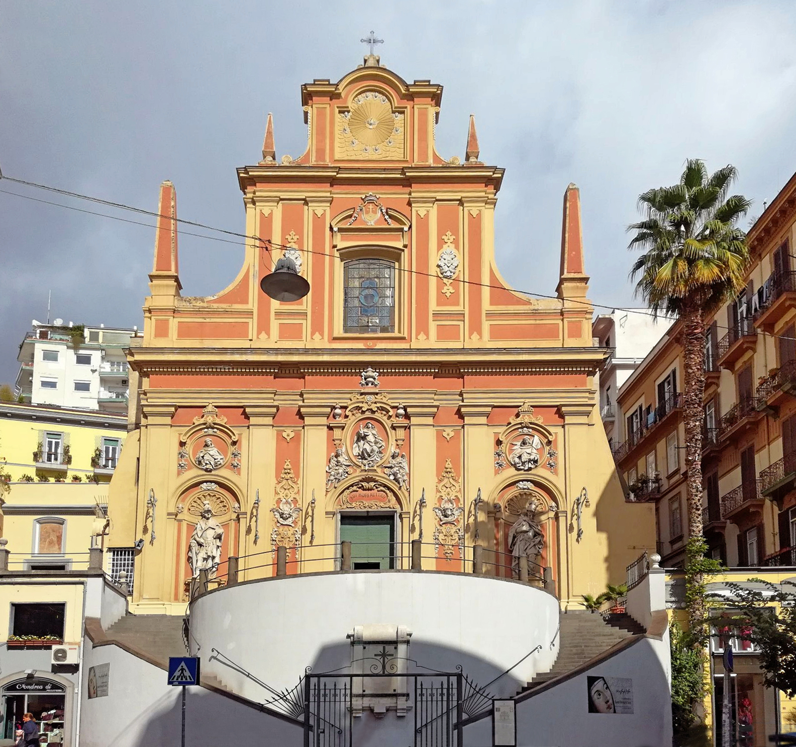 Santa Teresa a Chiaia (Facciata)